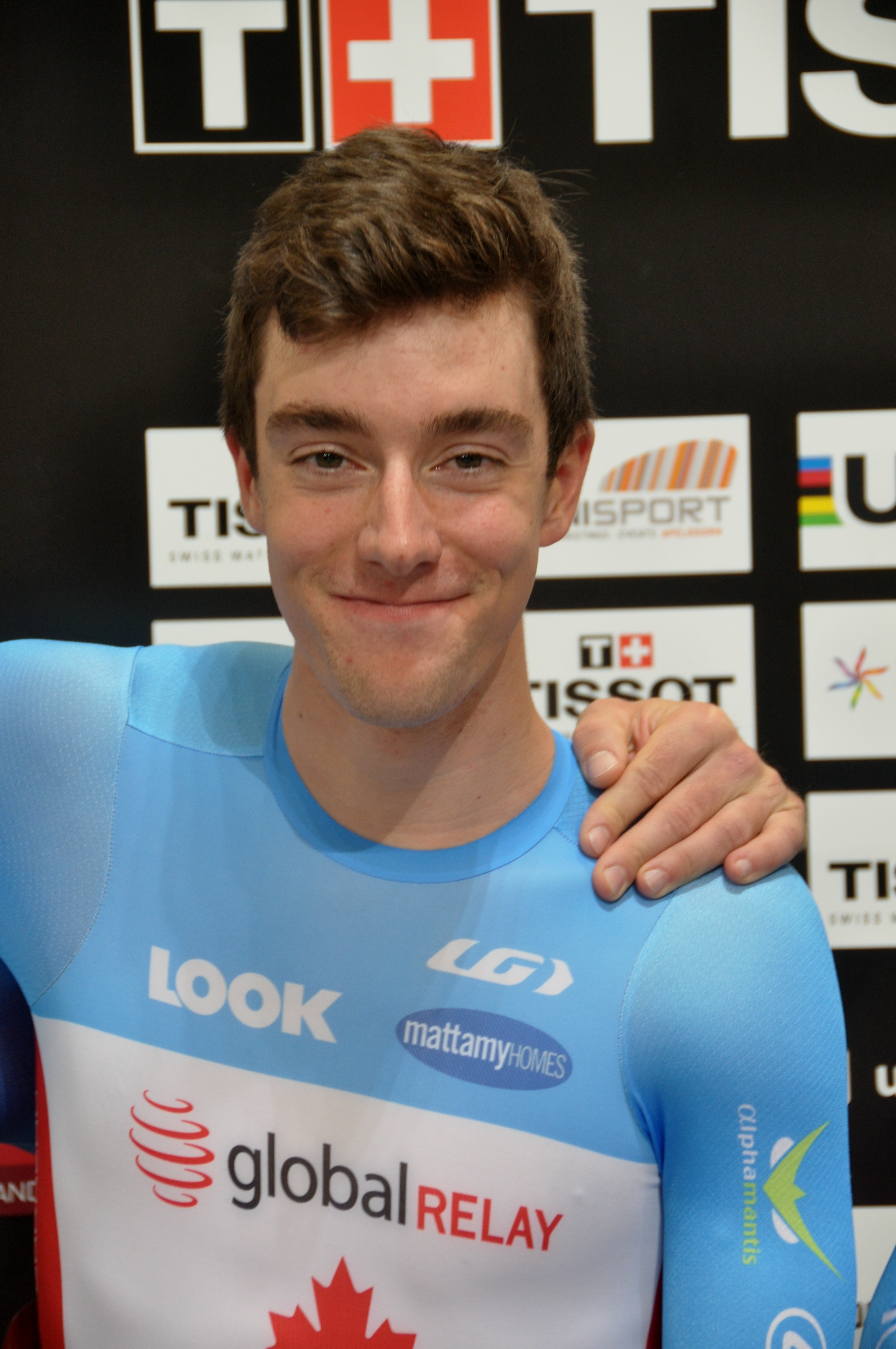 Bayley Simpson, kanadischer Radsportler